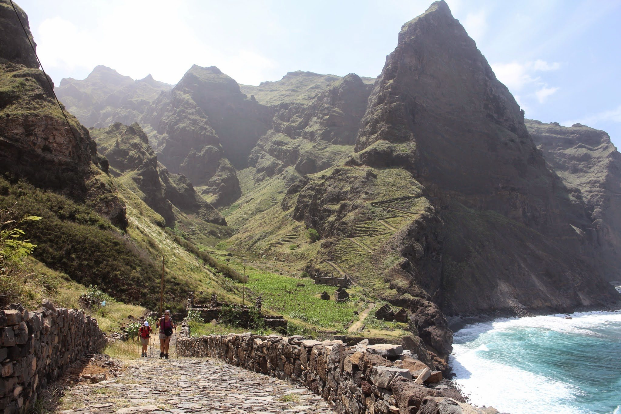 falaises du littoral nord de l'île de Santo Antão (Cap-Vert)